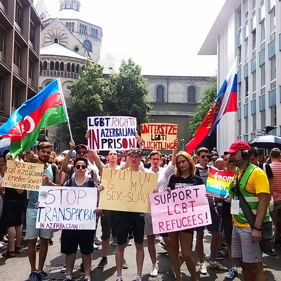 Азербайджанские ЛГБТ-активисты на гей-параде в Германии